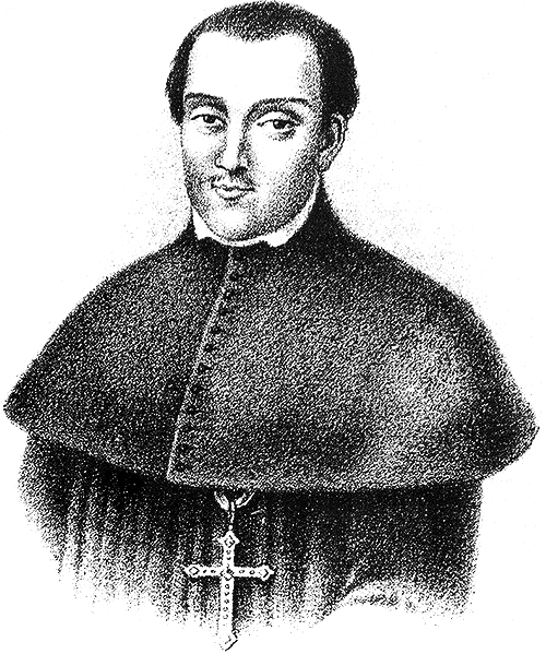 Diego Ladrón de Guevara, Obispo de Quito y Virrey del Perú